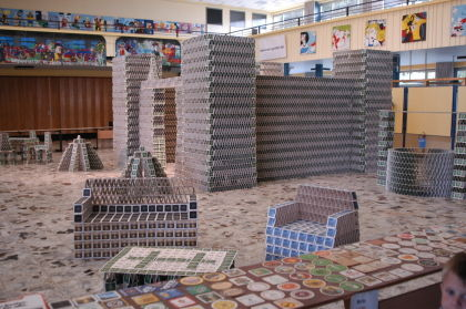 Zweiter Bierdeckel-Weltrekord - fertiges Objekt.